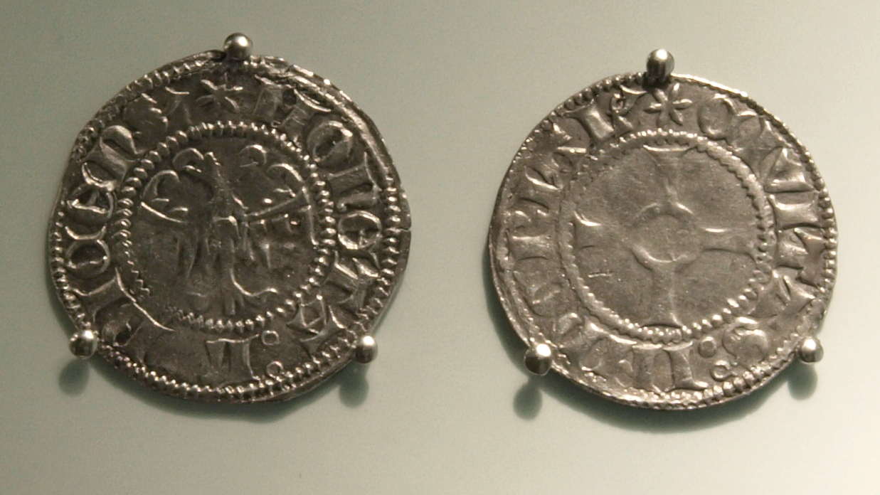 Lübeck Witte 1379-1381. Photographed at Museum für Hamburgische Geschichte, Hamburg, Germany.